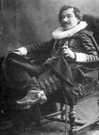 Pethes Imre (1864–1924) drámai színész Edmond Rostand Cyrano de Bergerac című színdarabjának főszerepében a Nemzeti Színházban 1904. szeptember 26-án.